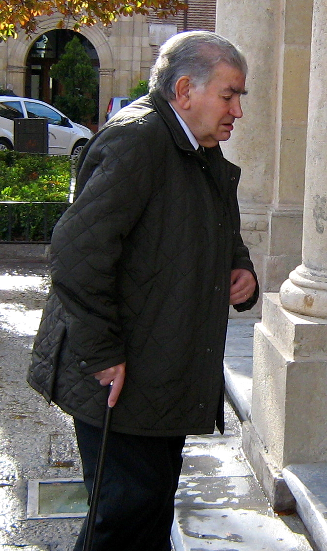 Antonio Gamoneda en la plaza de San Marcelo,León noviembre de 2007